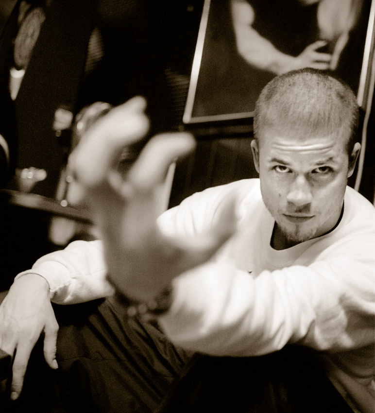 Rapper Lenny (Lennart Brede) 2001